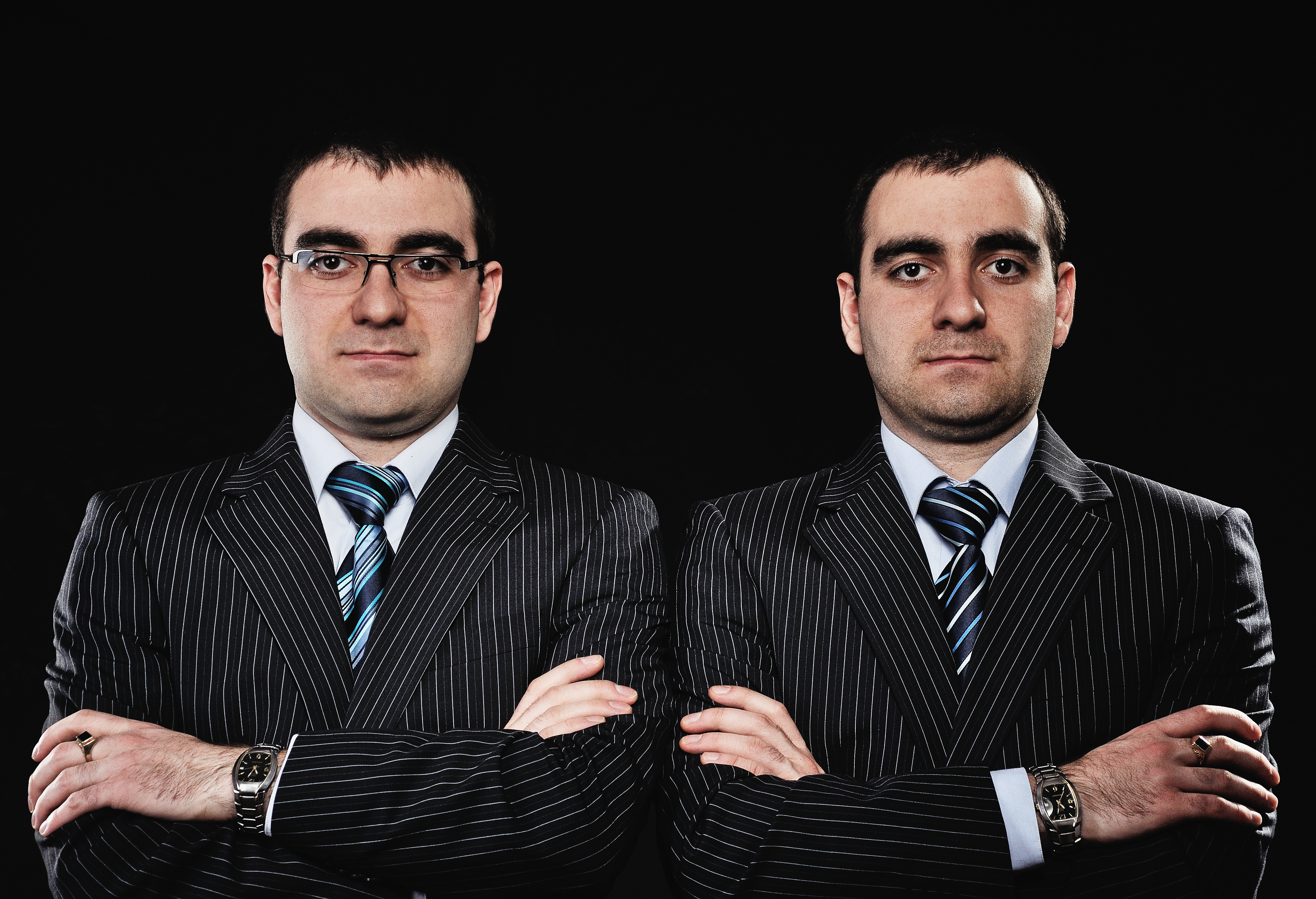 Петър и Росен Теодосиеви - инициатори на Сдружение „Форум Наука“.